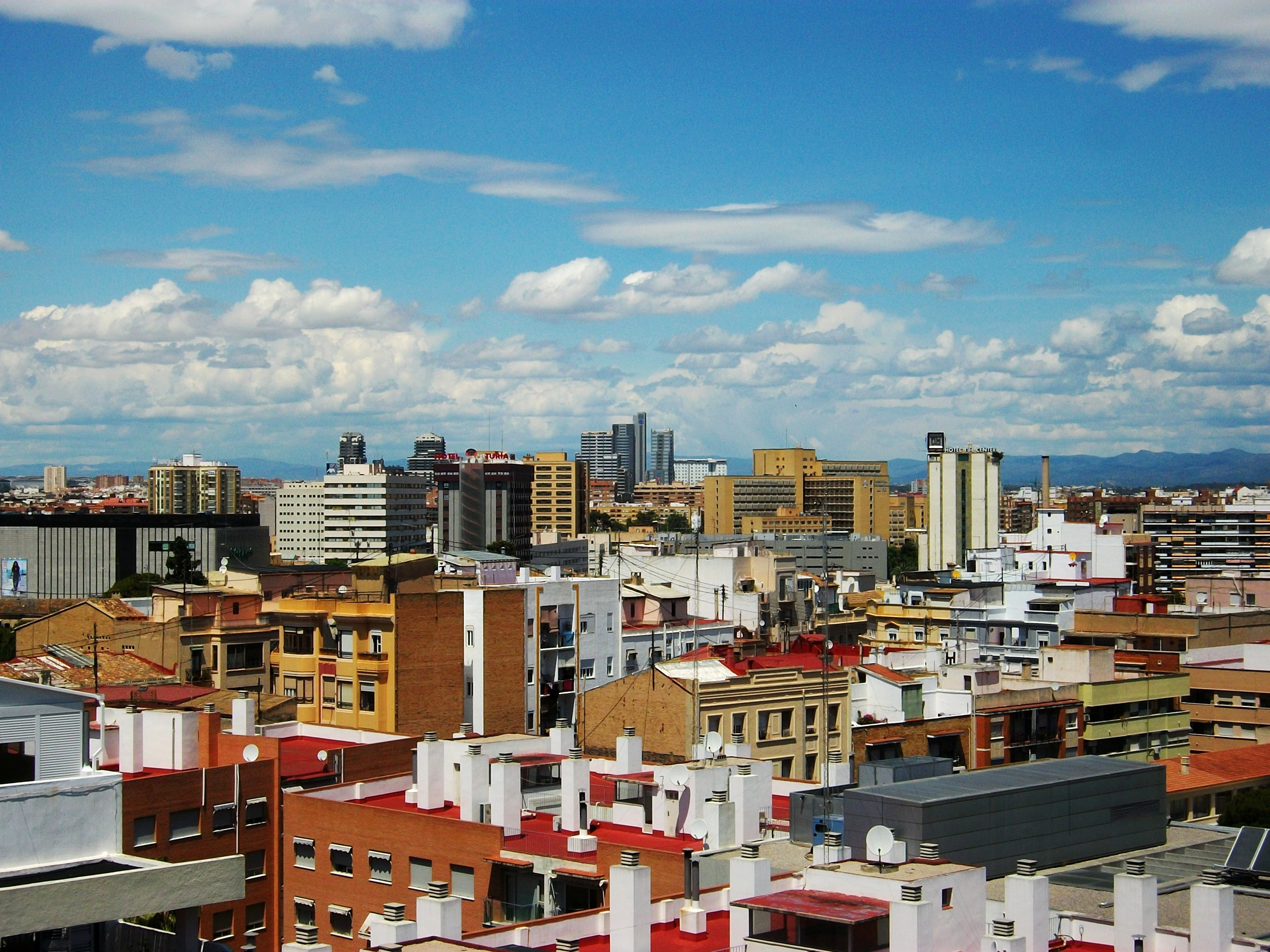 Vista del nord de la ciutat des de les torres de Quart. Es pot observar l'Hospital la Fe o l'Hotel Hilton al fons.